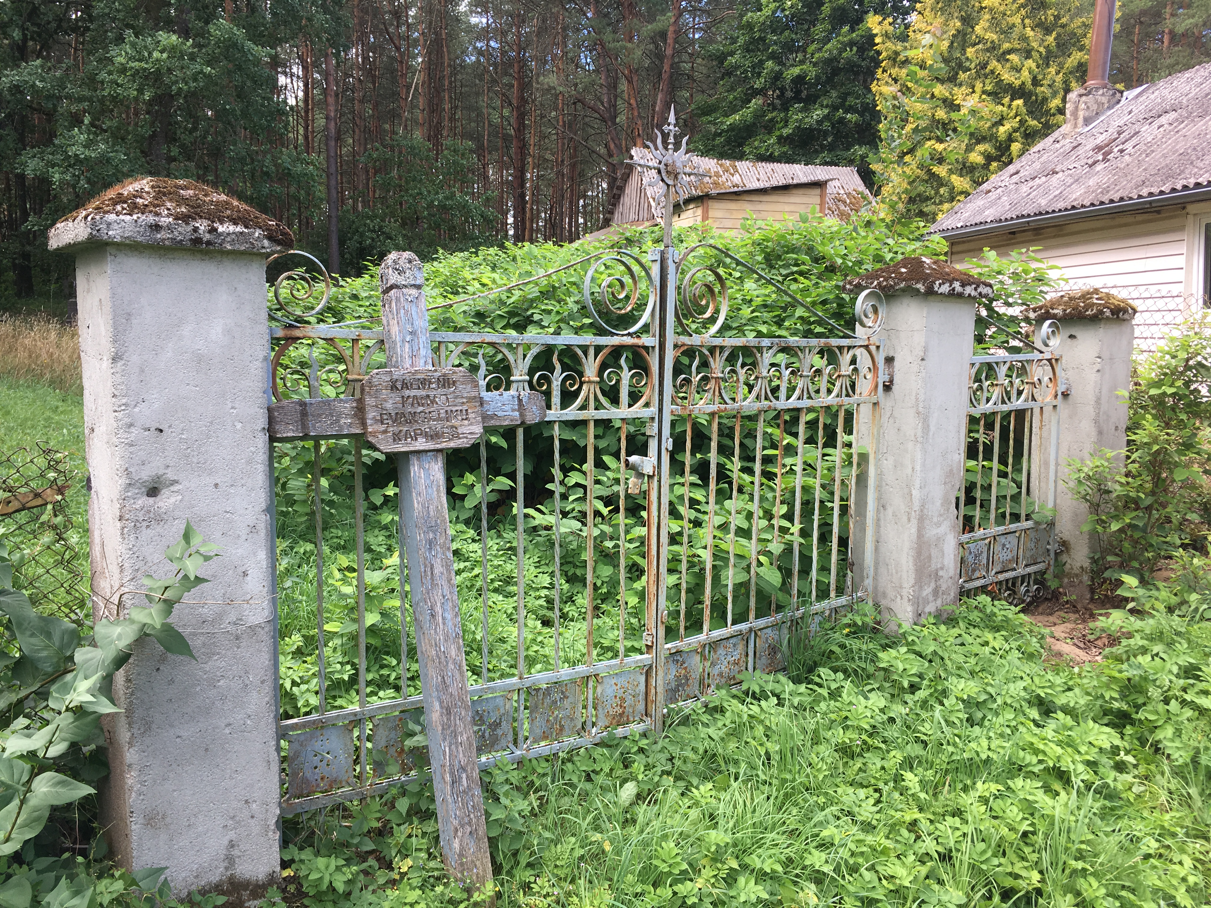 Kalnenu senkapio vartai